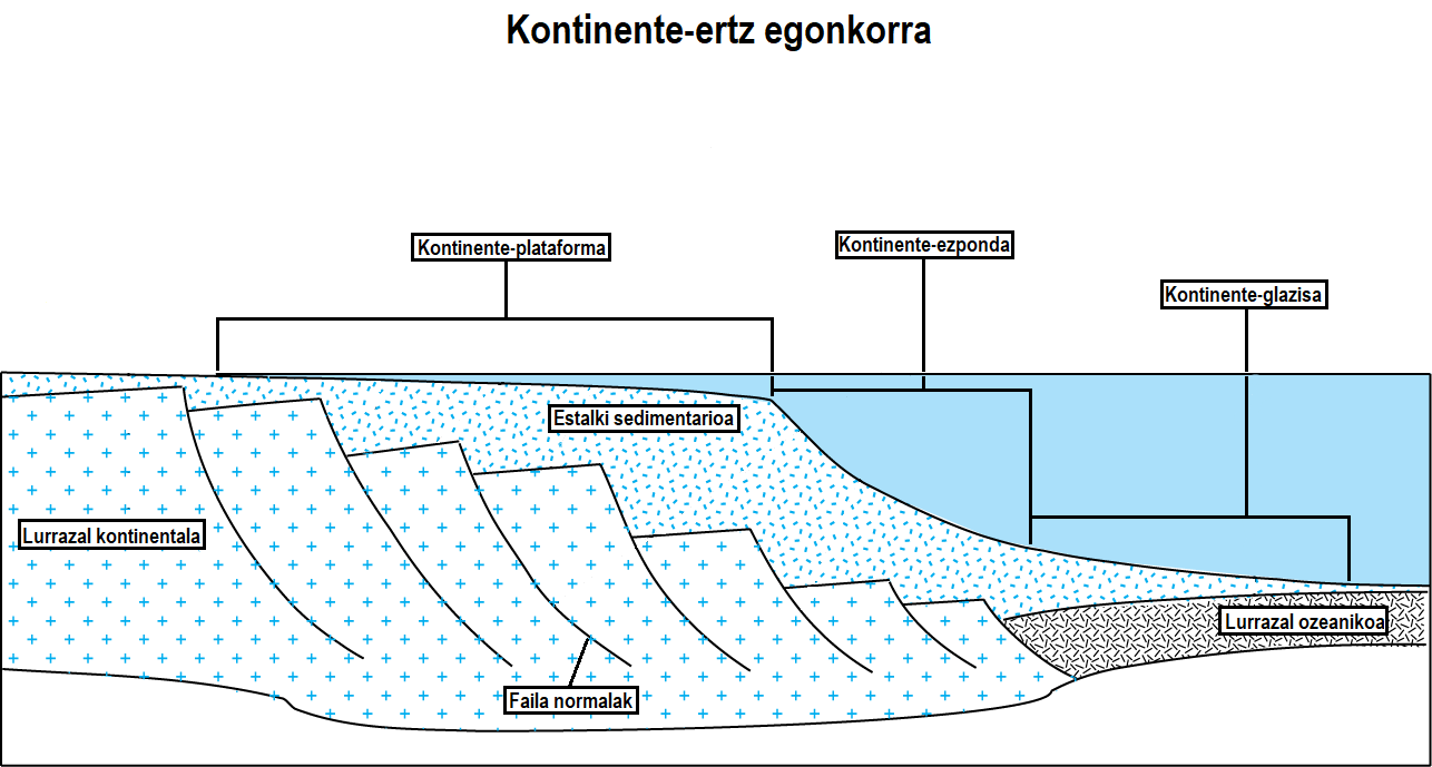 Irudi honetan kontinente-ertz baten barne egitura azaltzeaz gain, kanpo egitura erakusten du